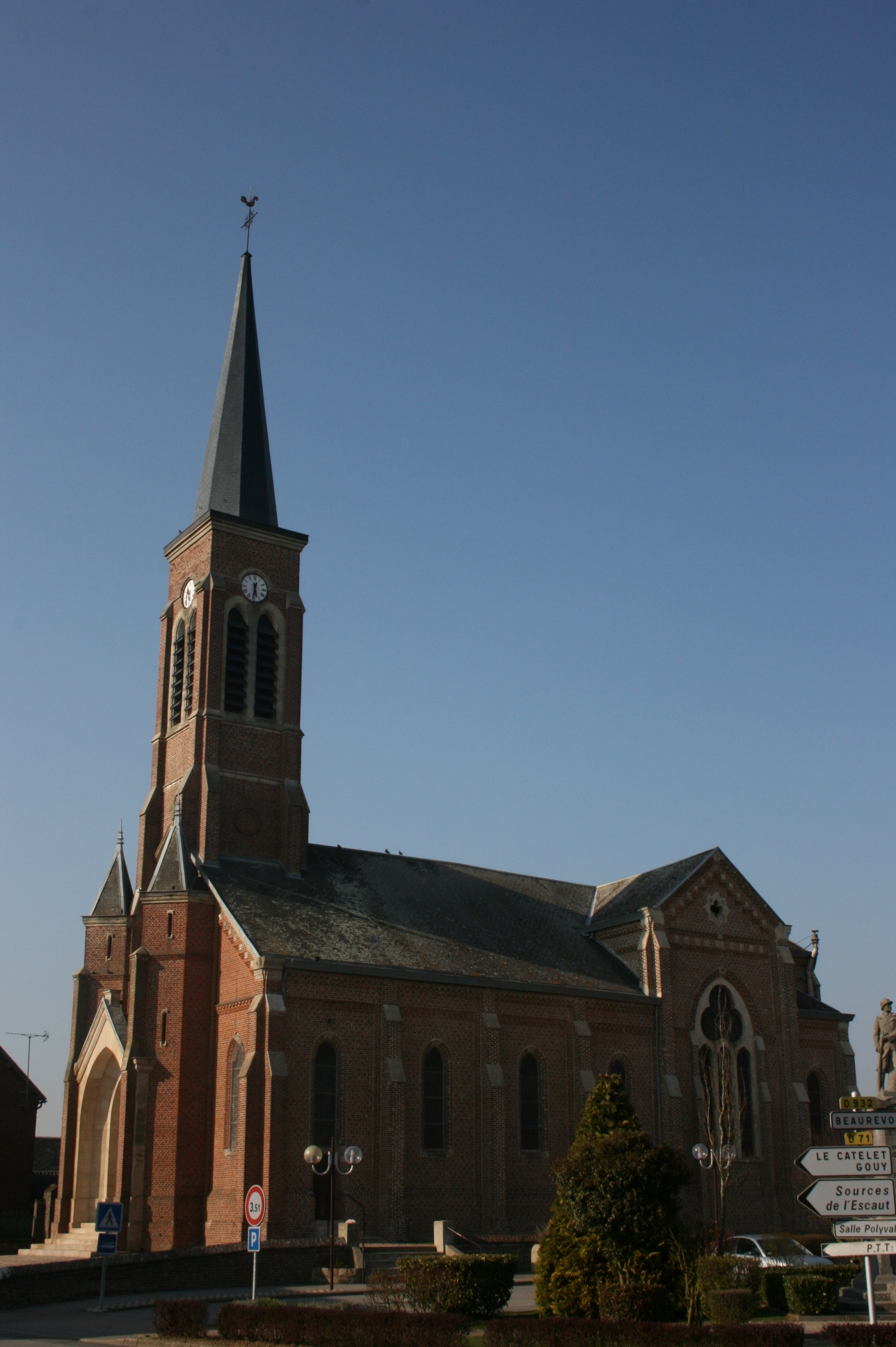 L'église d'Estrées vue de la place